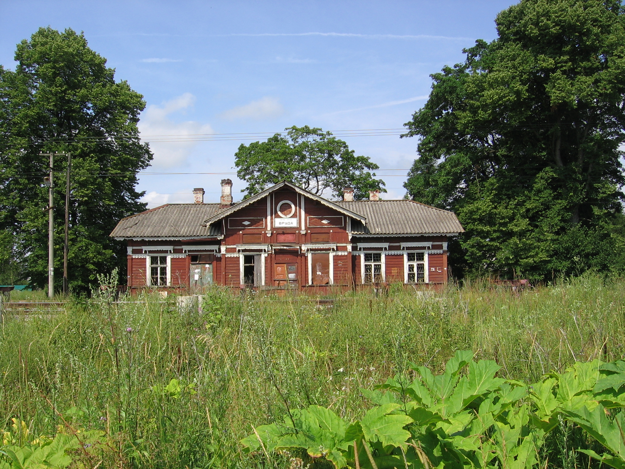 Вруда, заброшенный вокзал